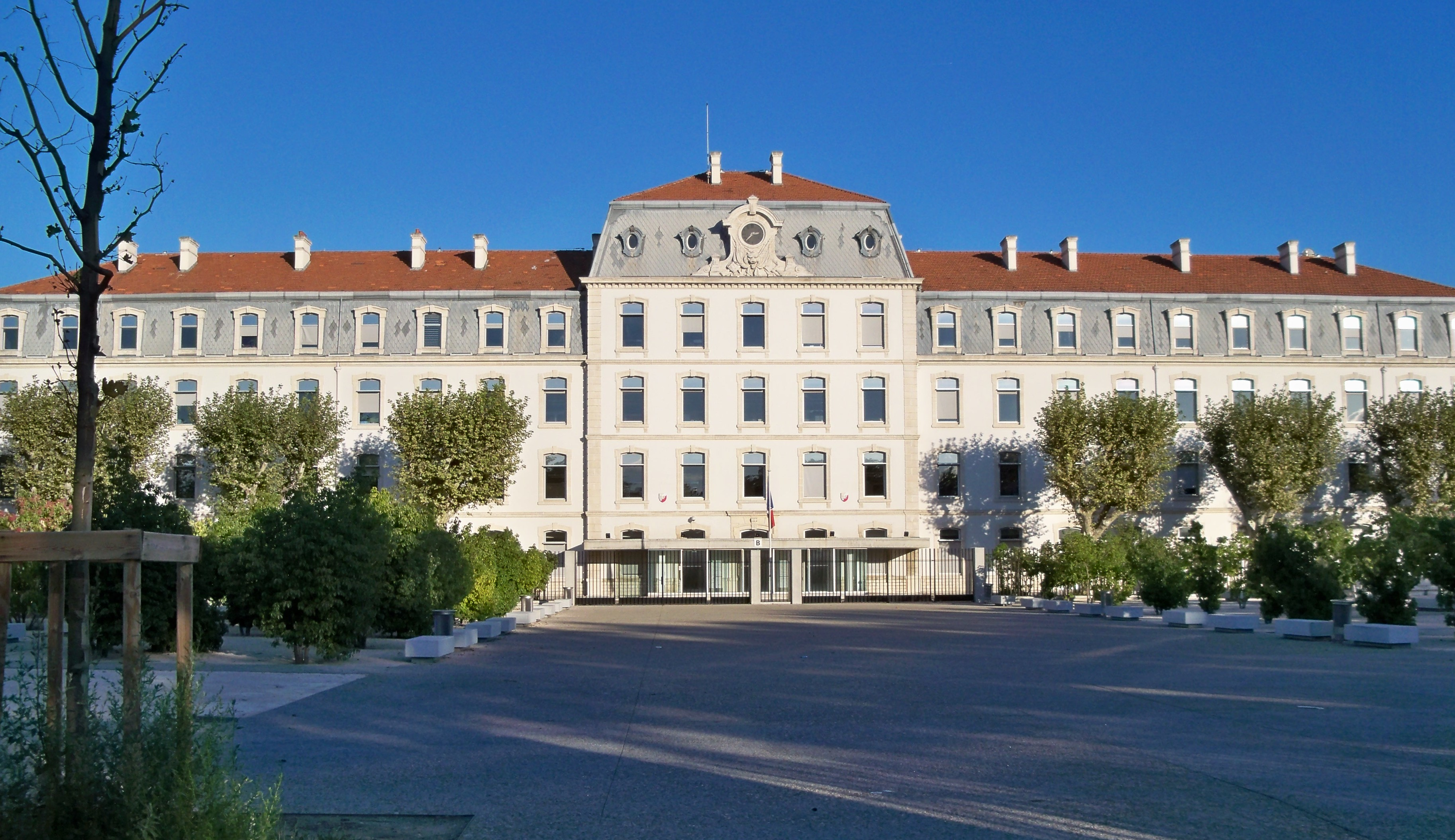 Préfécture du Vaucluse (84)